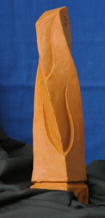 Modelo original en arcilla del "Obelisco FI": estatuilla del máximo galardón de la arquitectura en Costa Rica, obra del escultor y arquitecto Ibo Bonilla